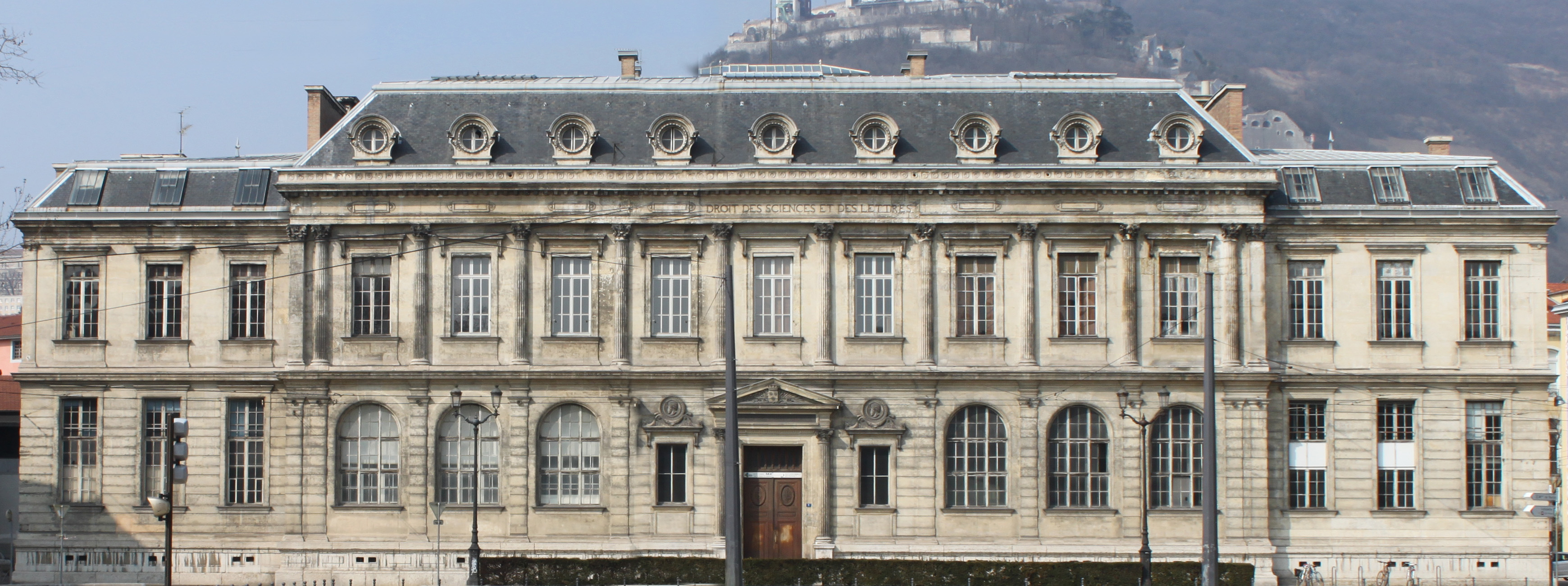 IUT2 Grenoble, Site Verdun